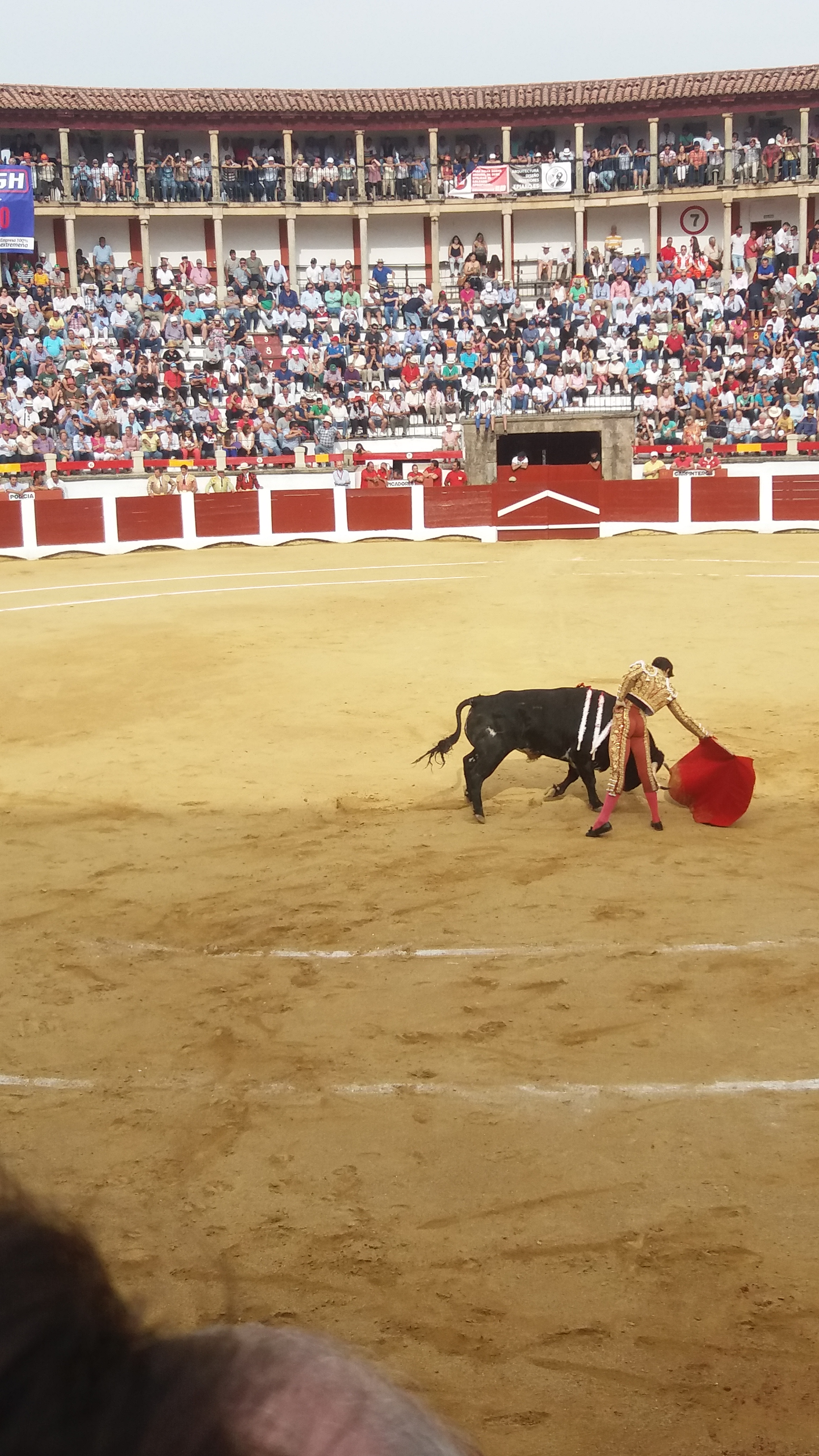 Roca Rey cuajando un Derechazo en la era de los martires(Cáceres)